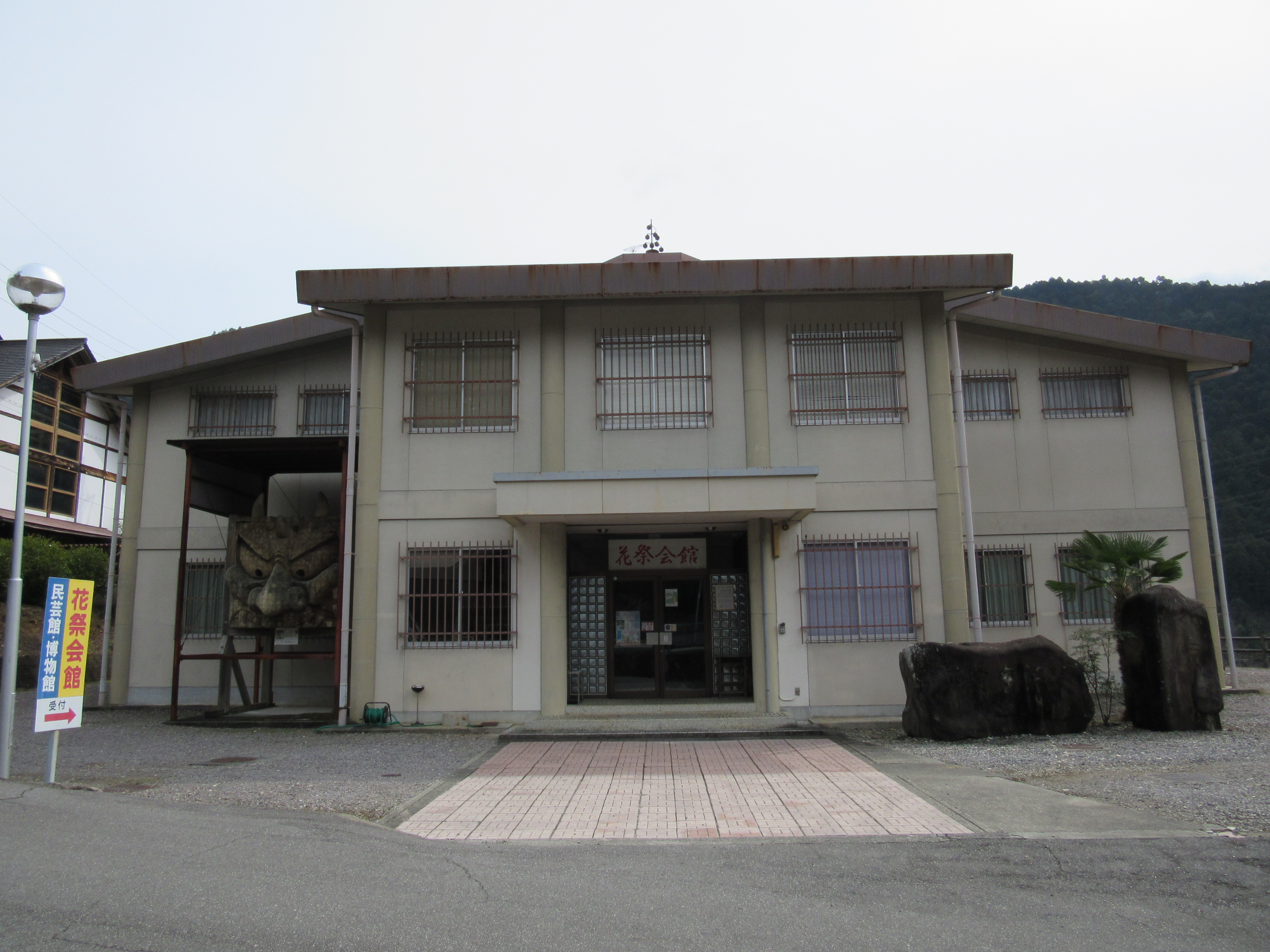 東栄町花祭会館